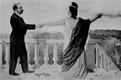 Diosa Minerva mostrándole a Manuel Estrada Cabrera todo lo que ha conseguido con las fiestas minervalias.